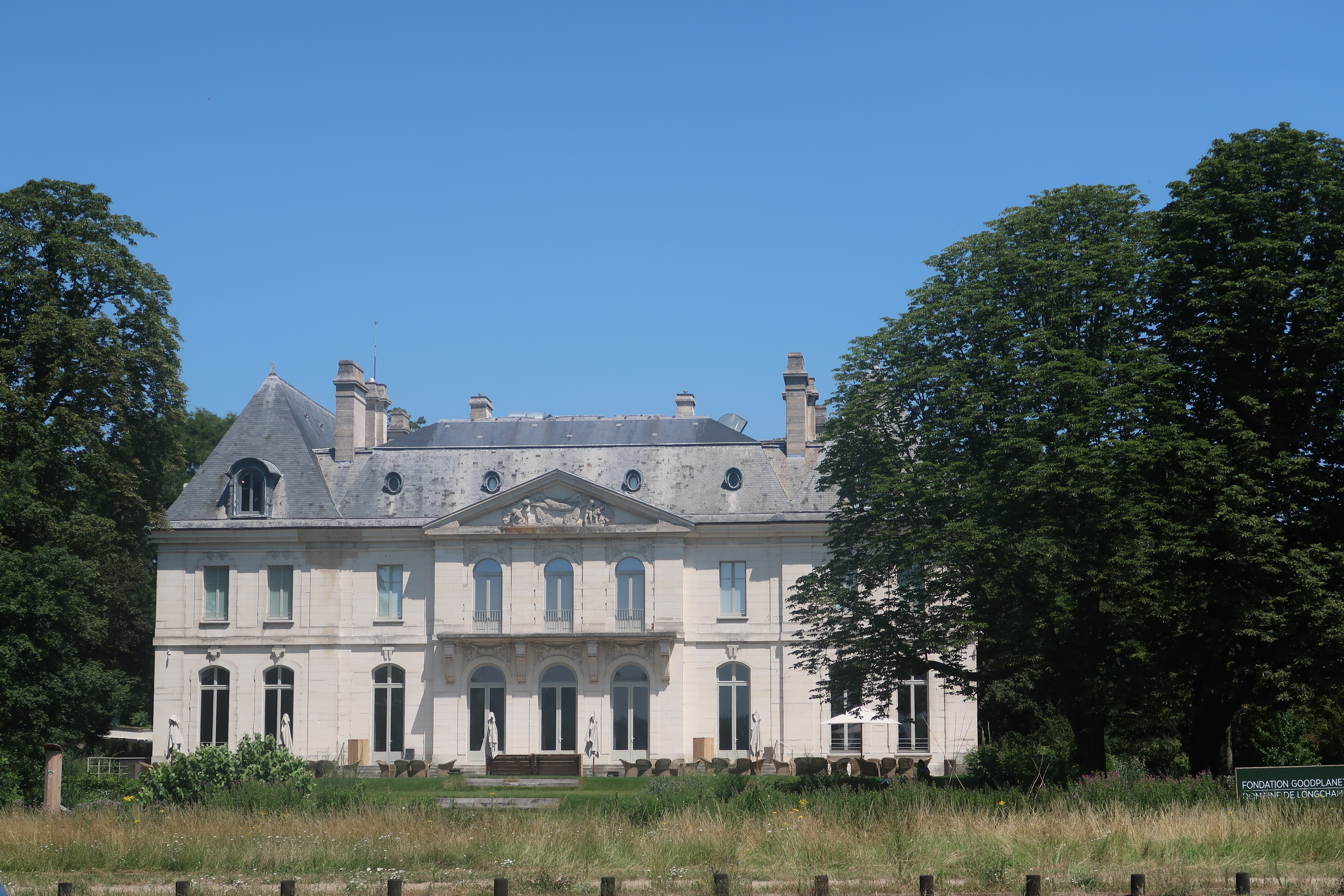 Château de Longchamp, bâtiment de la fondation GoodPlanet (bois de Boulogne, Paris, 16e).